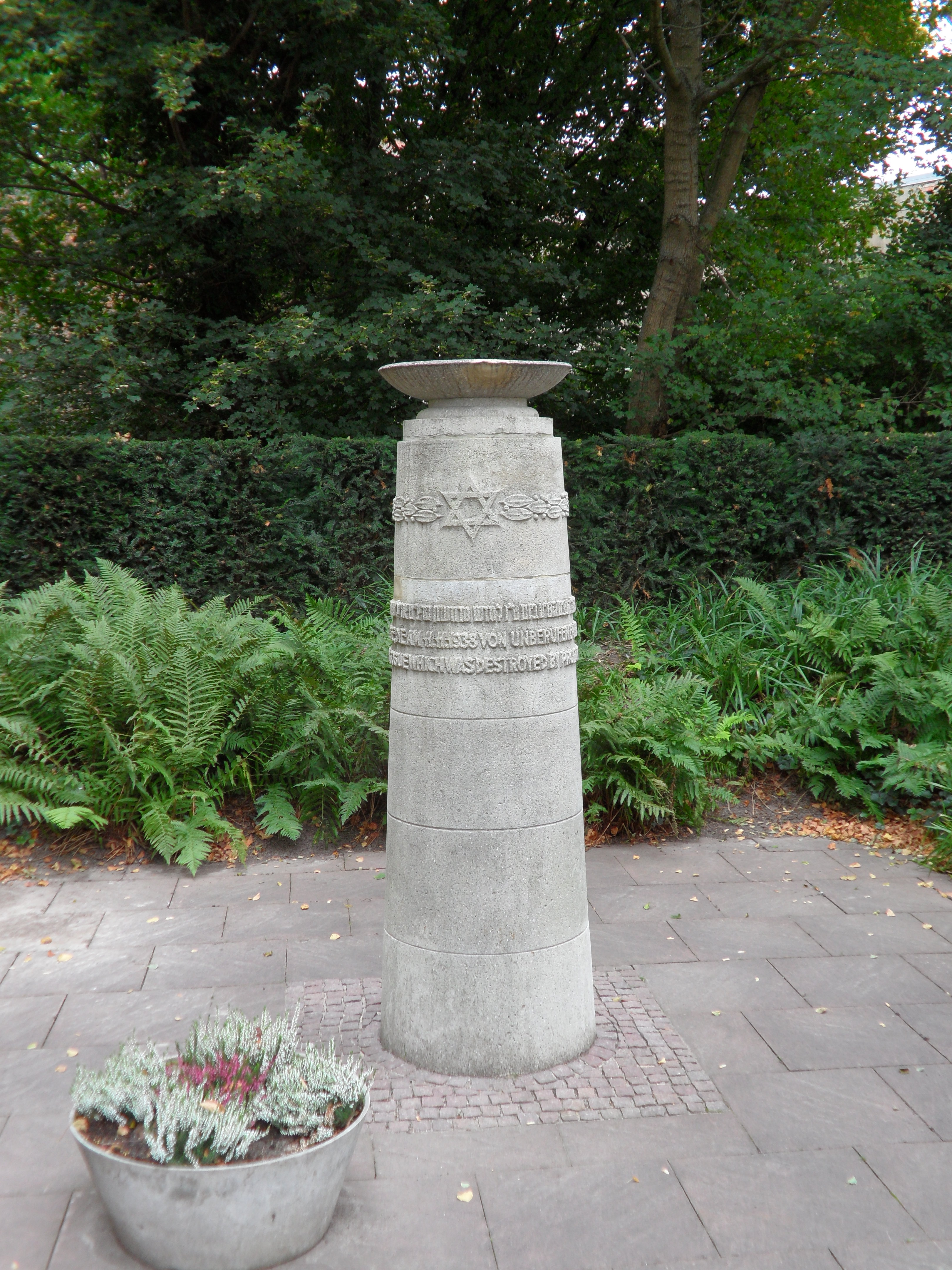 Denkmal für die ehem. Peiner Synagoge